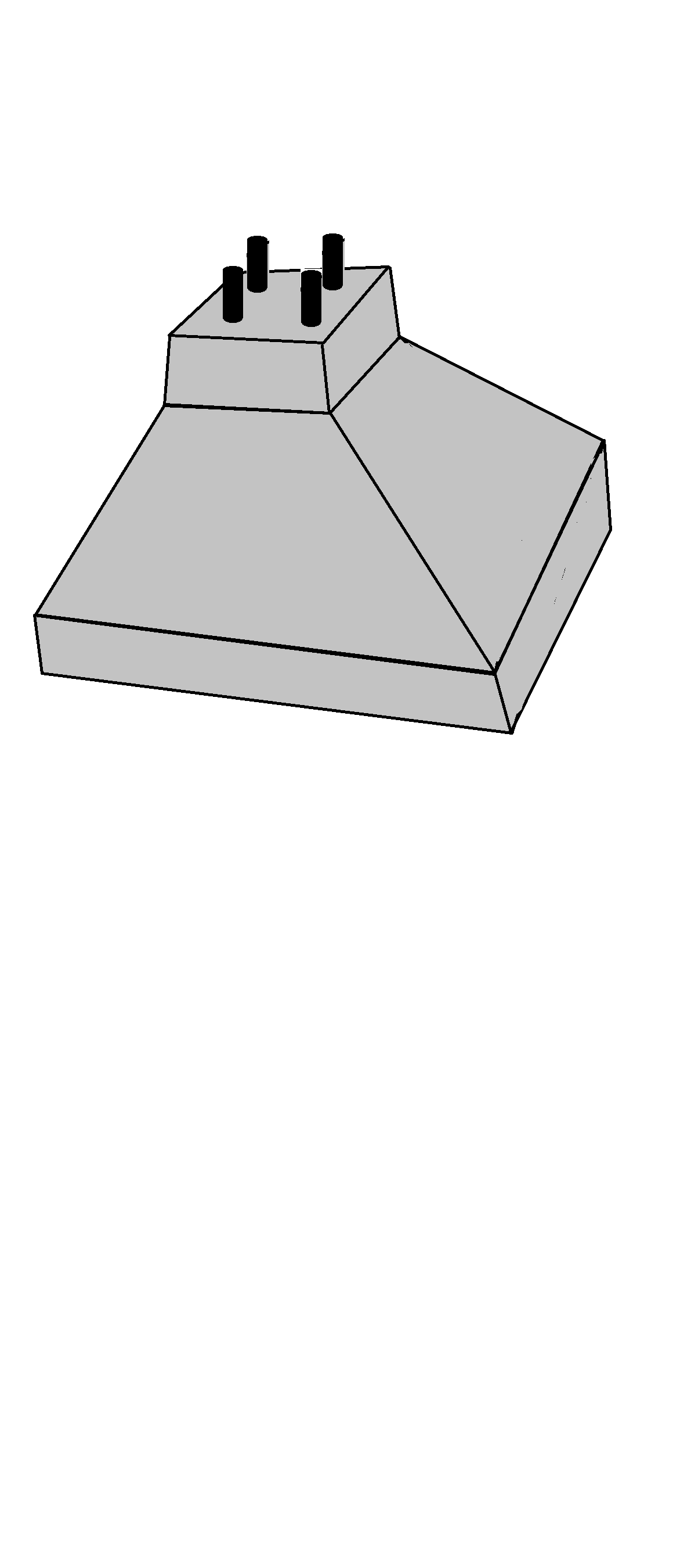 יסוד בודד